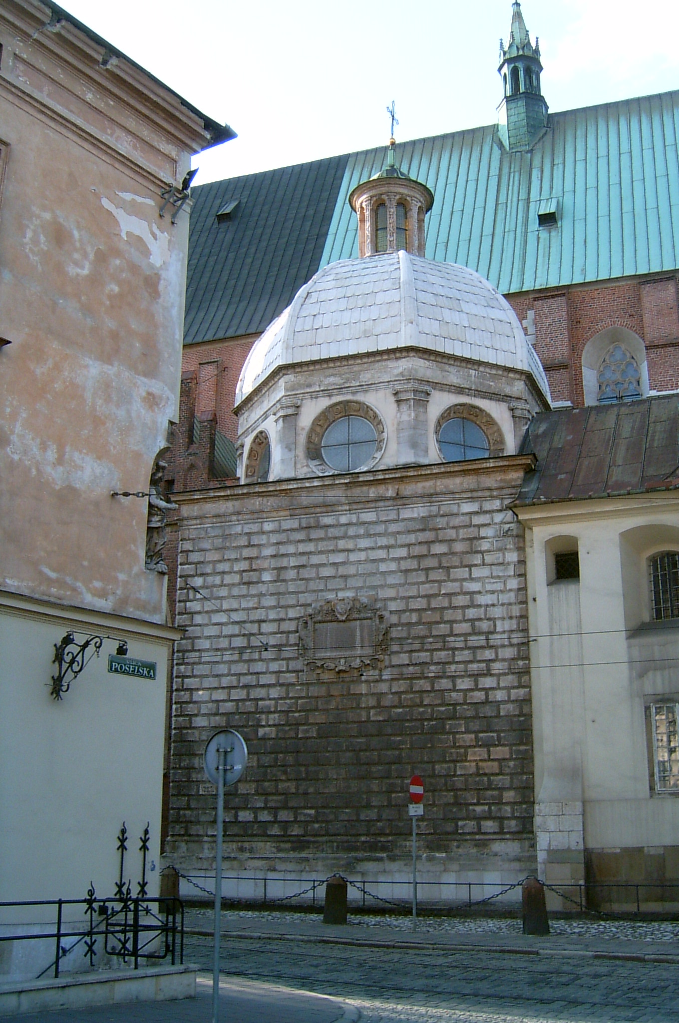 Kraków, Poland